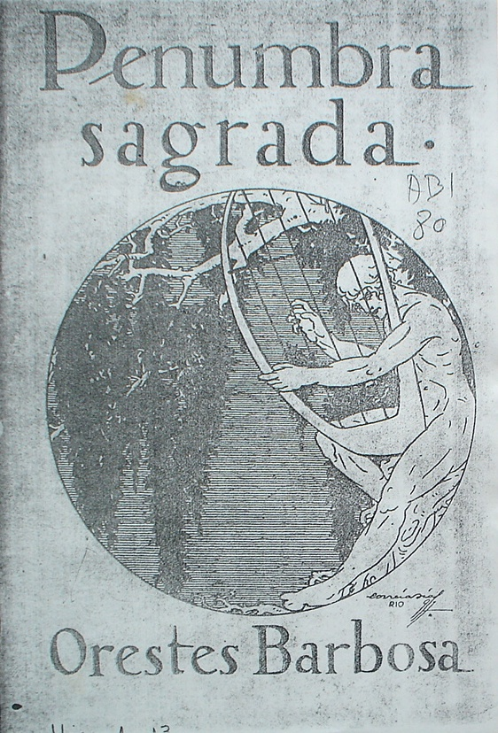 Capa de Penumbra Sagrada, de 1917, feita por Correia Dais, pintor, caricaturista e desenhista, morto em 1935.